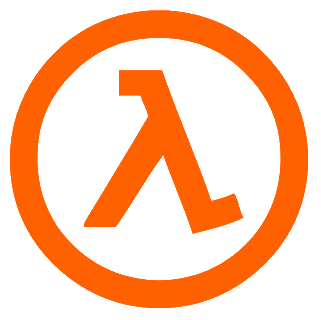 Half-Life Lambda